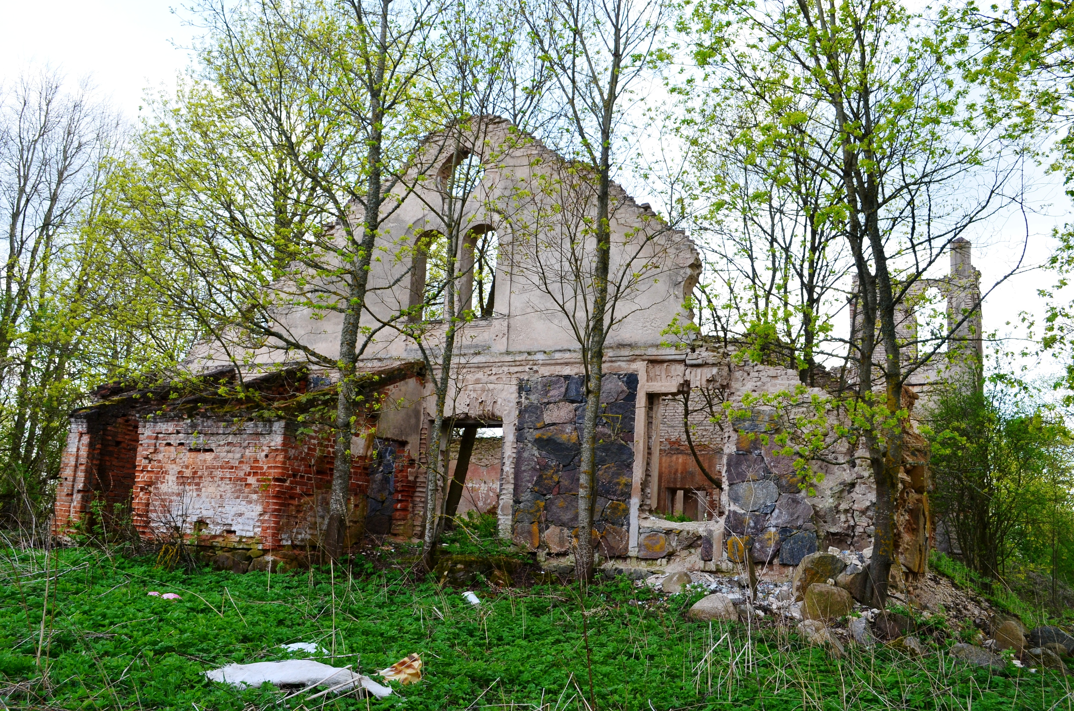 Aukštadvario dvaras, Panevėžio raj.